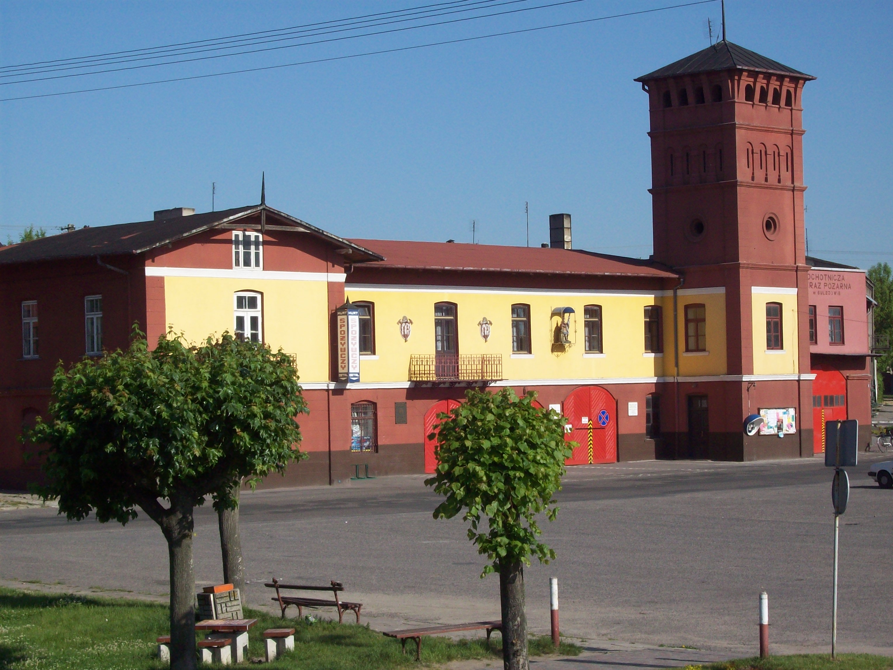 OSP w Sulejowie. Widok z wału.